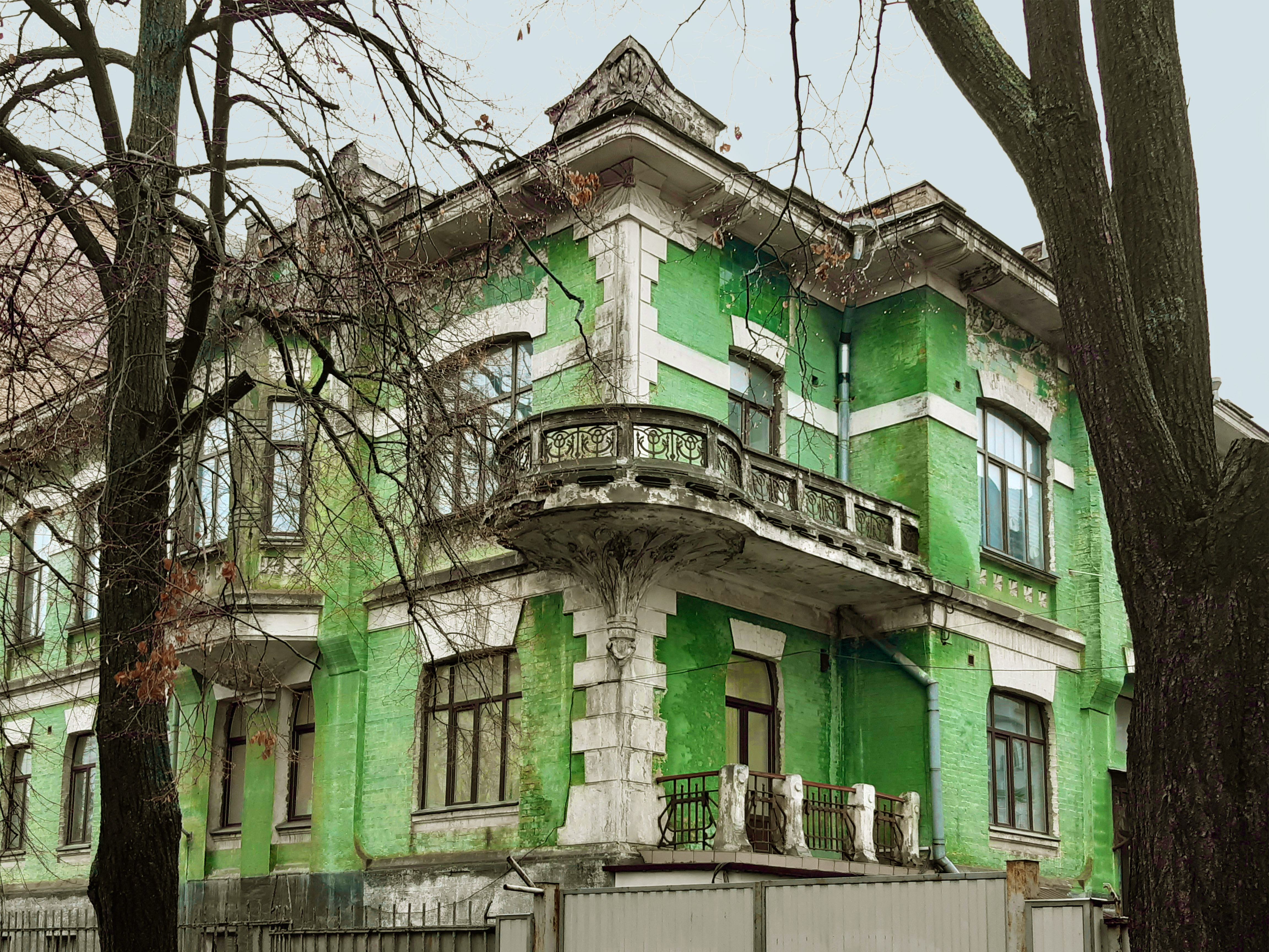 Будинок з ірисами, Київ, вул. Юрія Іллєнка, 8